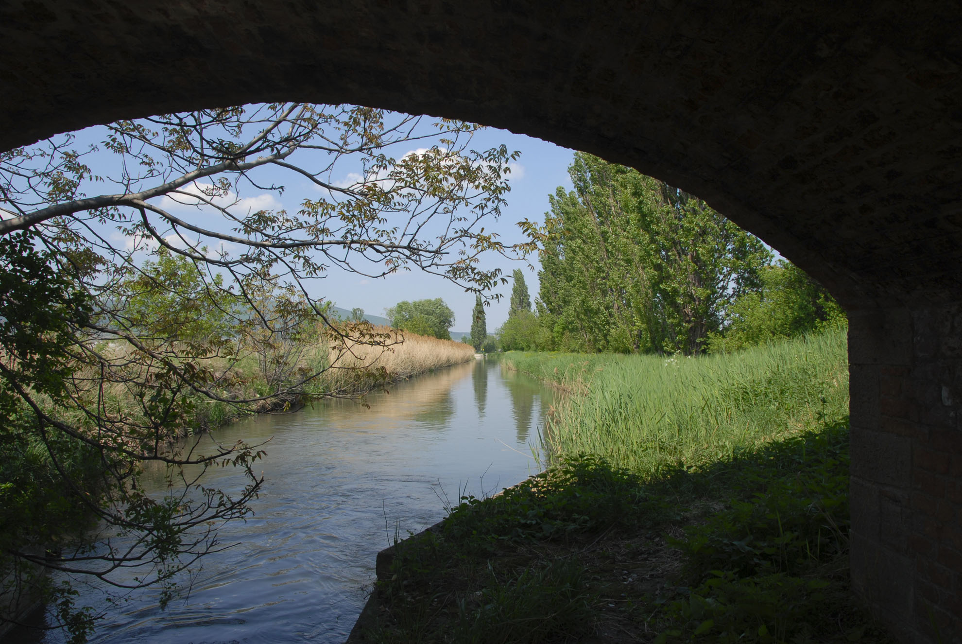 Viehtriebbrücke am Wr. Neustaedter Kanal